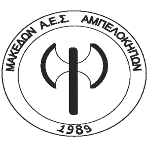 Σύμβολο δύναμης και κύρους η Λάβρυς ήταν πολεμικό και ιερατικό εργαλείο